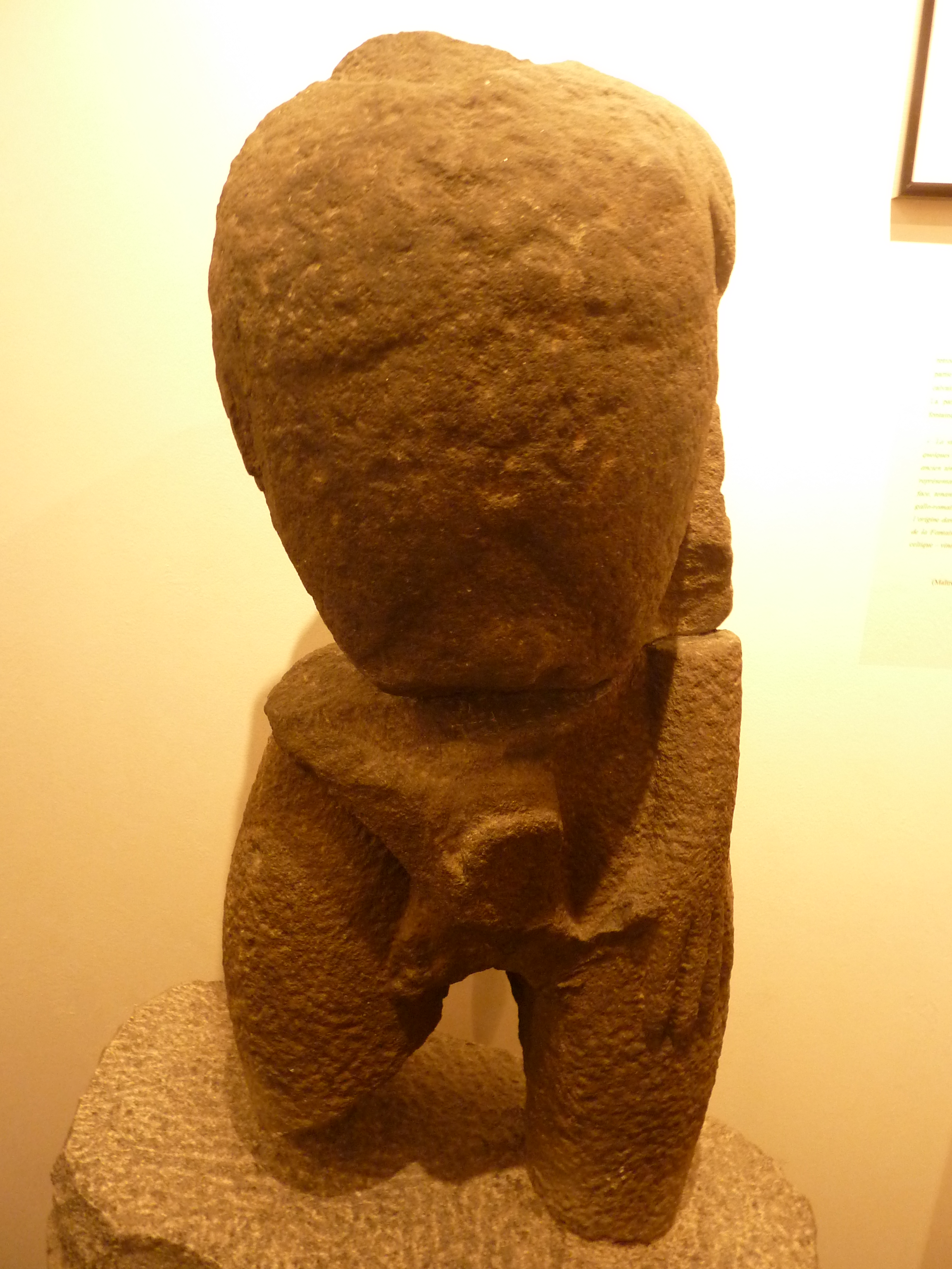 Plougastel-Daoulas : statue en pierre de kersanton d'un dieu de la fécondité (barbu et tenant son sexe dans sa main droite) retrouvé en 1976 au fond de la chapelle de la Fontaine-Blanche où elle avait été cachée car jugée indécente ; elle daterait de l'époque gallo-romaine (Musée de la fraise et du patrimoine)